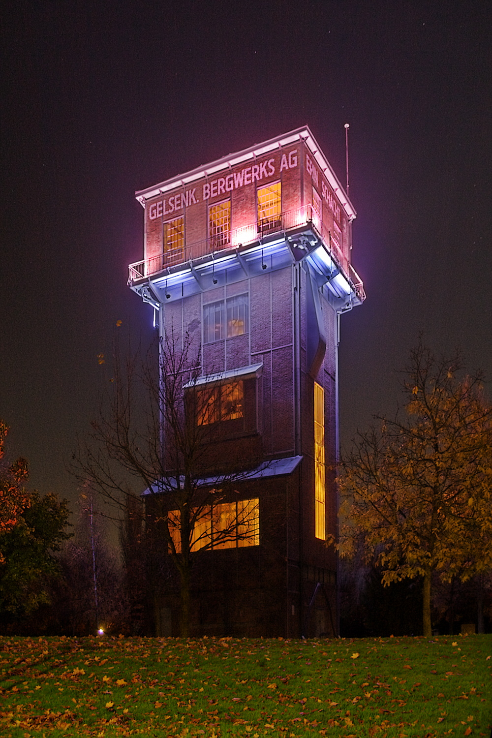 Luftschacht der Zeche Erin in Castrop-Rauxel bei Nacht. Das Bild ist ein farbgemapptes HDR.